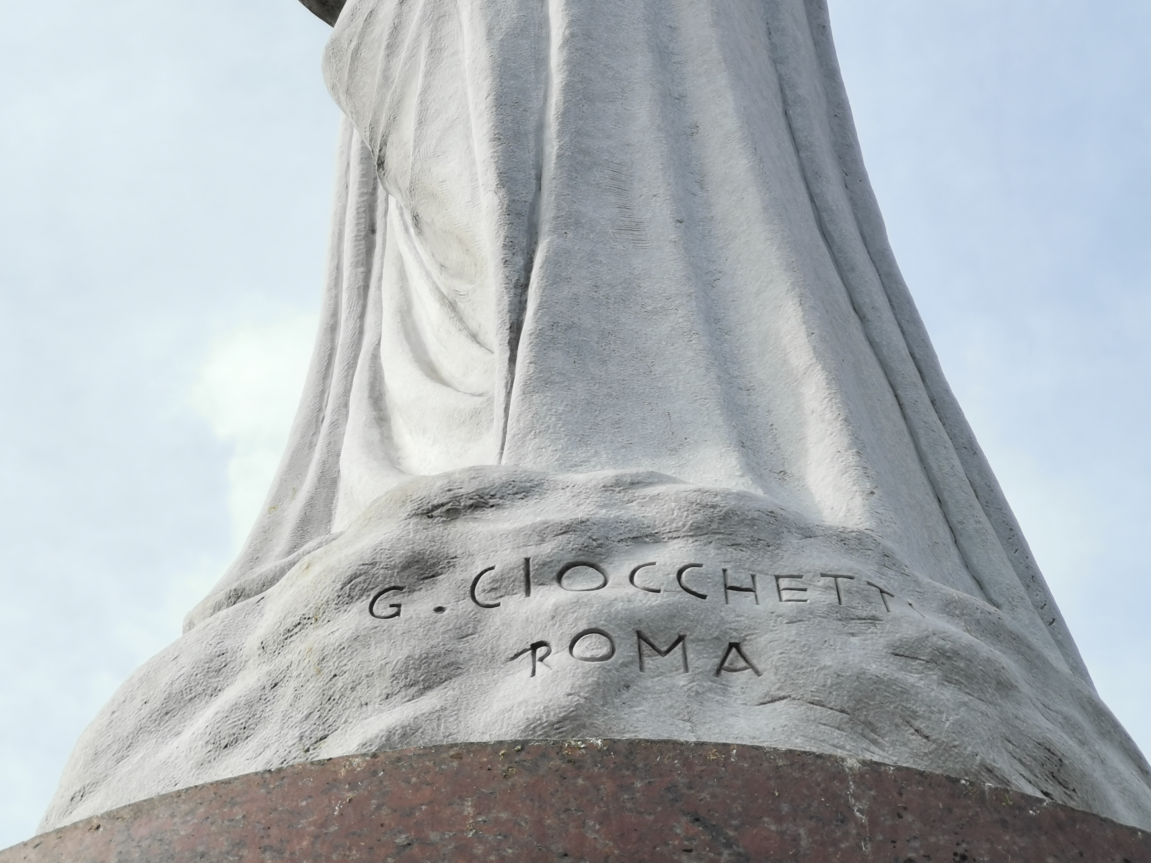 Tên tác giả bức tượng được khắc dưới chân bên phải bức tượng